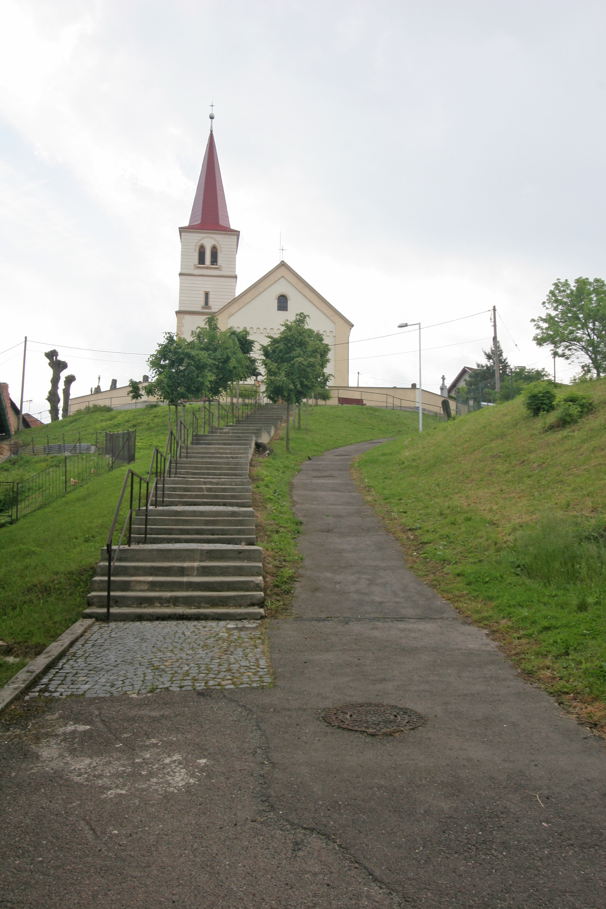 Kostel sv. Petra a Pavla (Rozhovice), Rozhovice